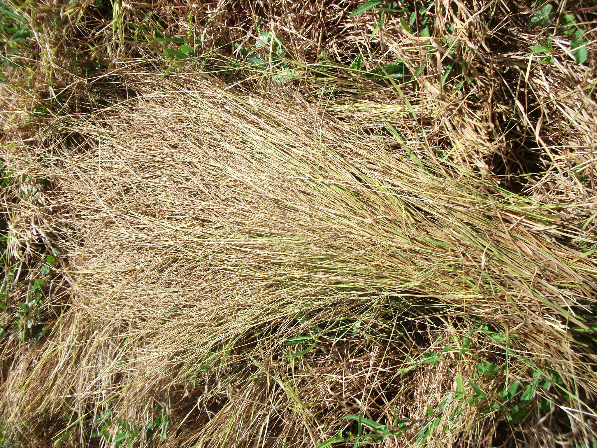 Fonio